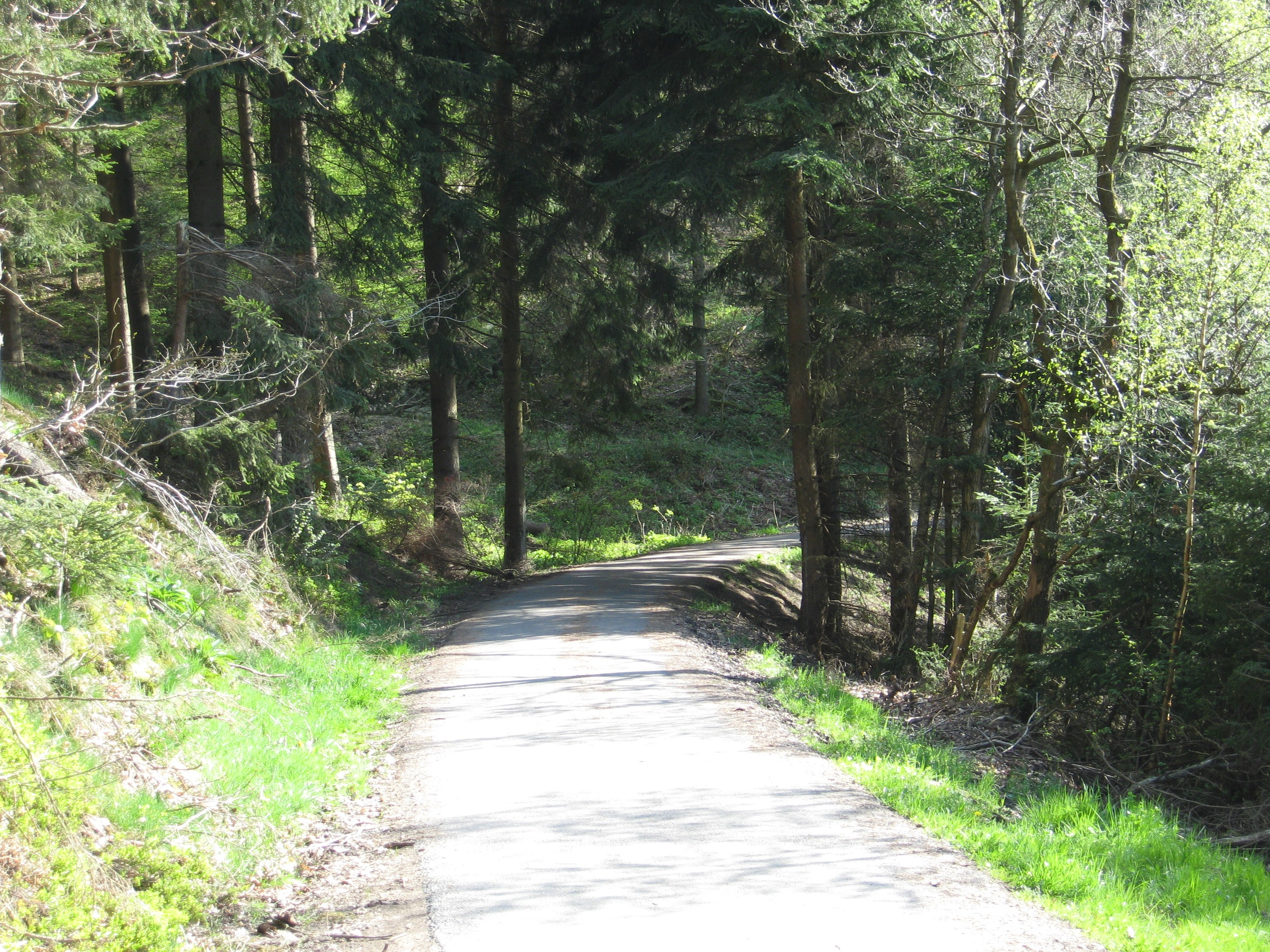 Das "Bähnchen", die Trasse einer ehemaligen Schmalspurbahn der Grube Bautenberg zum Neunkirchener Bahnhof, hier bei Salchendorf.